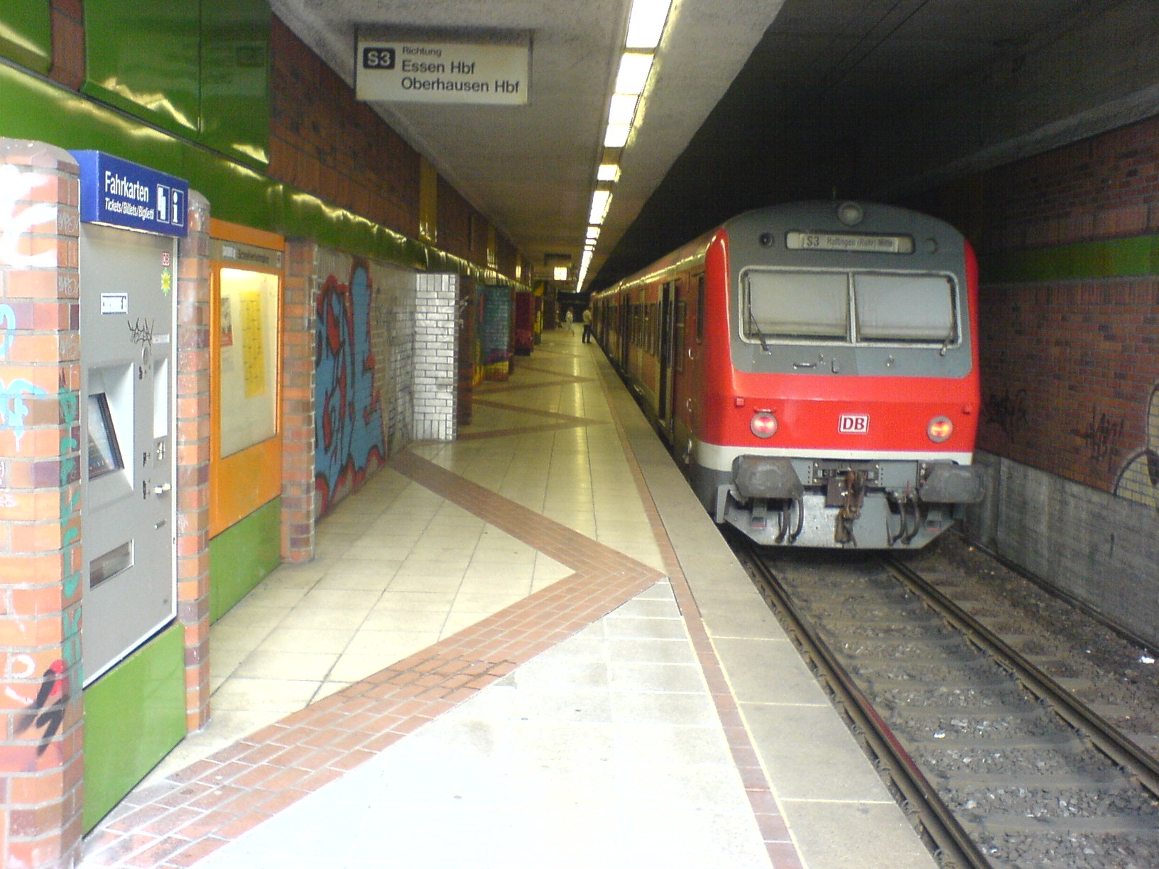 Bahnhof Hattingen Mitte